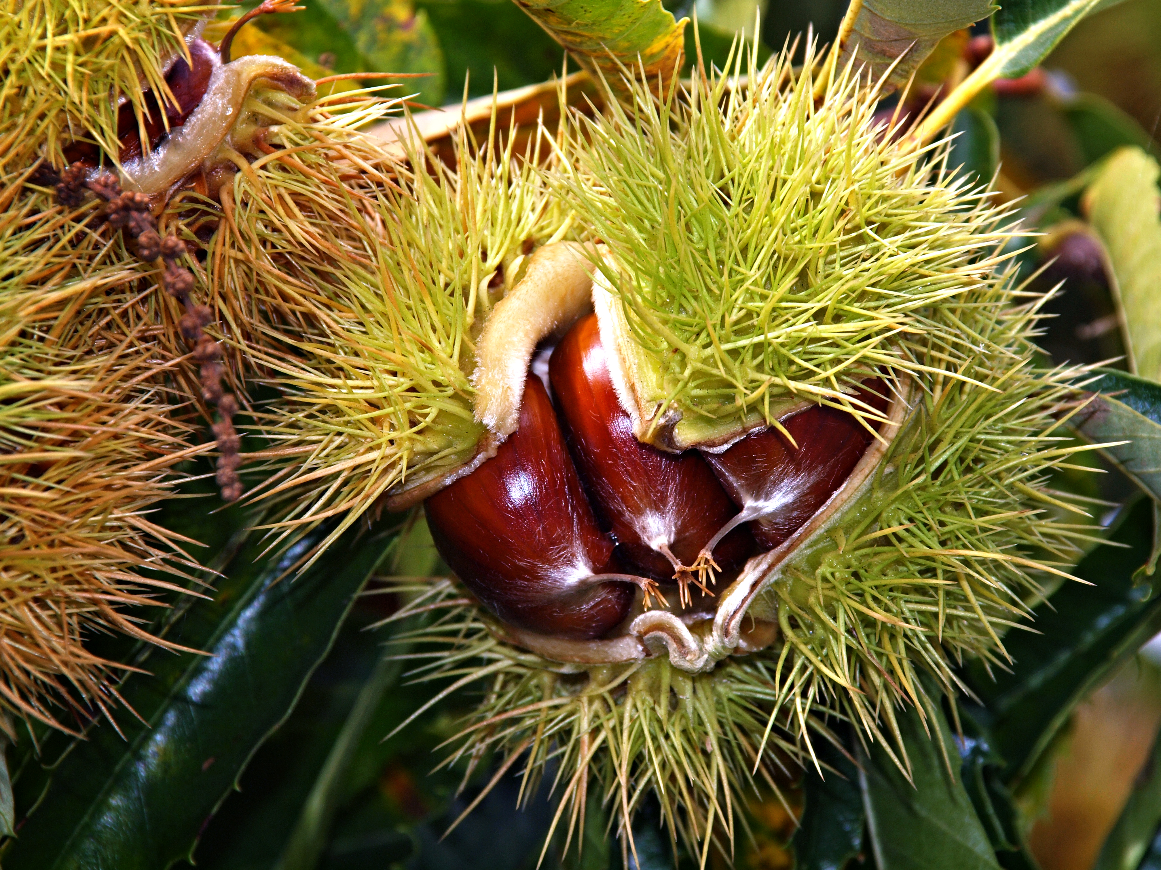 Vivario (Corse) - Châtaignes